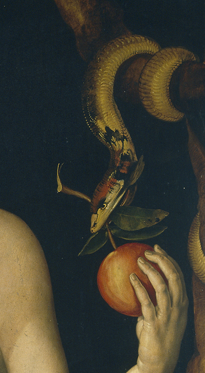 Ausschnitt aus Albrecht Dürers zweiteiligem Gemälde Adam und Eva: Die Schlange überreicht Eva die verbotene Frucht.